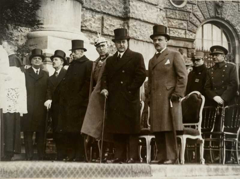 Bildnis des Papen, Franz von [1879-1969] zusammen mit Mitgliedern ausländischer Gesandtschaften auf dem Heldenplatz in Wien anlässlich einer Fahnenübergabe an neue österreichische Regimenter.